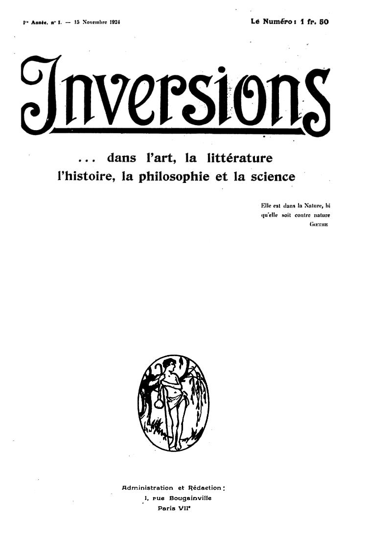 Inversions... dans l'art, la littérature, l'histoire, la philosophie et la science, revue française (1924).